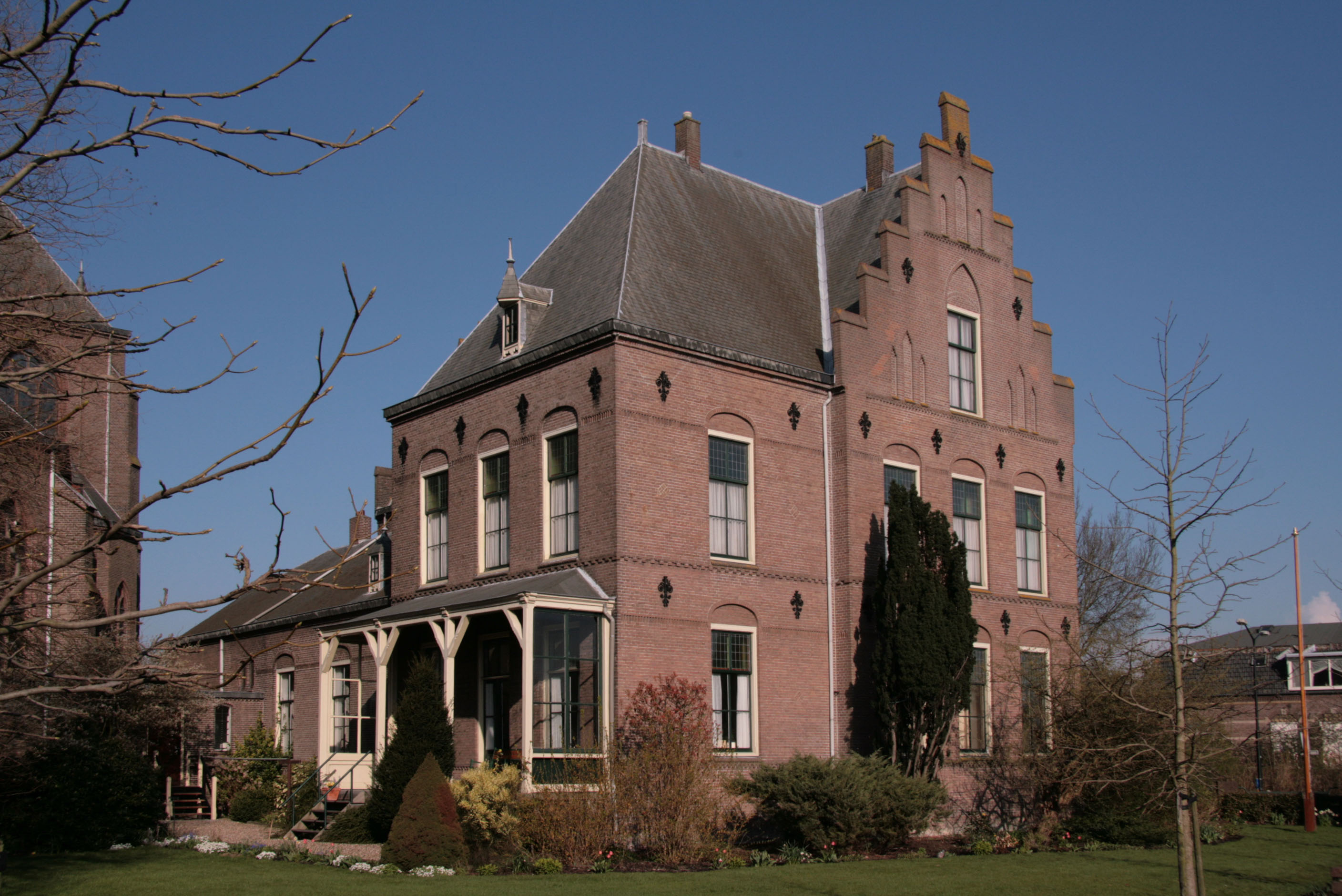 Bouwjaar 1881-83. Architect Alfred Tepe.